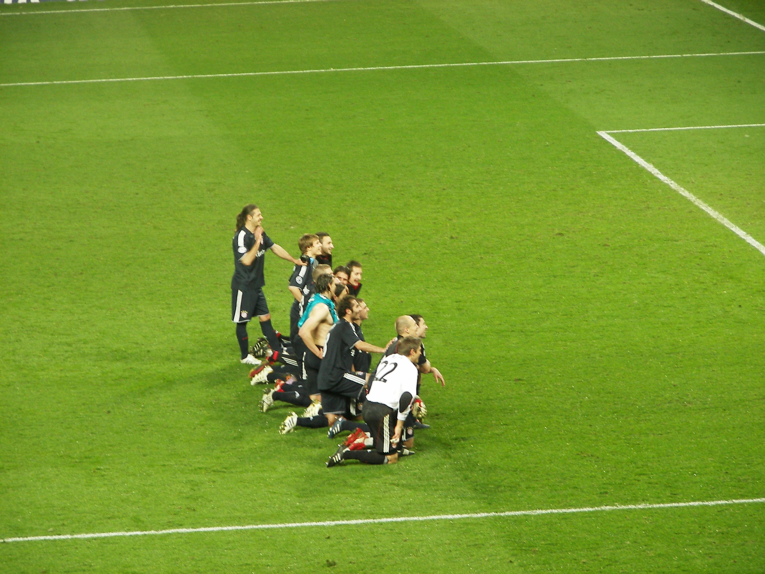 Martín Demichelis